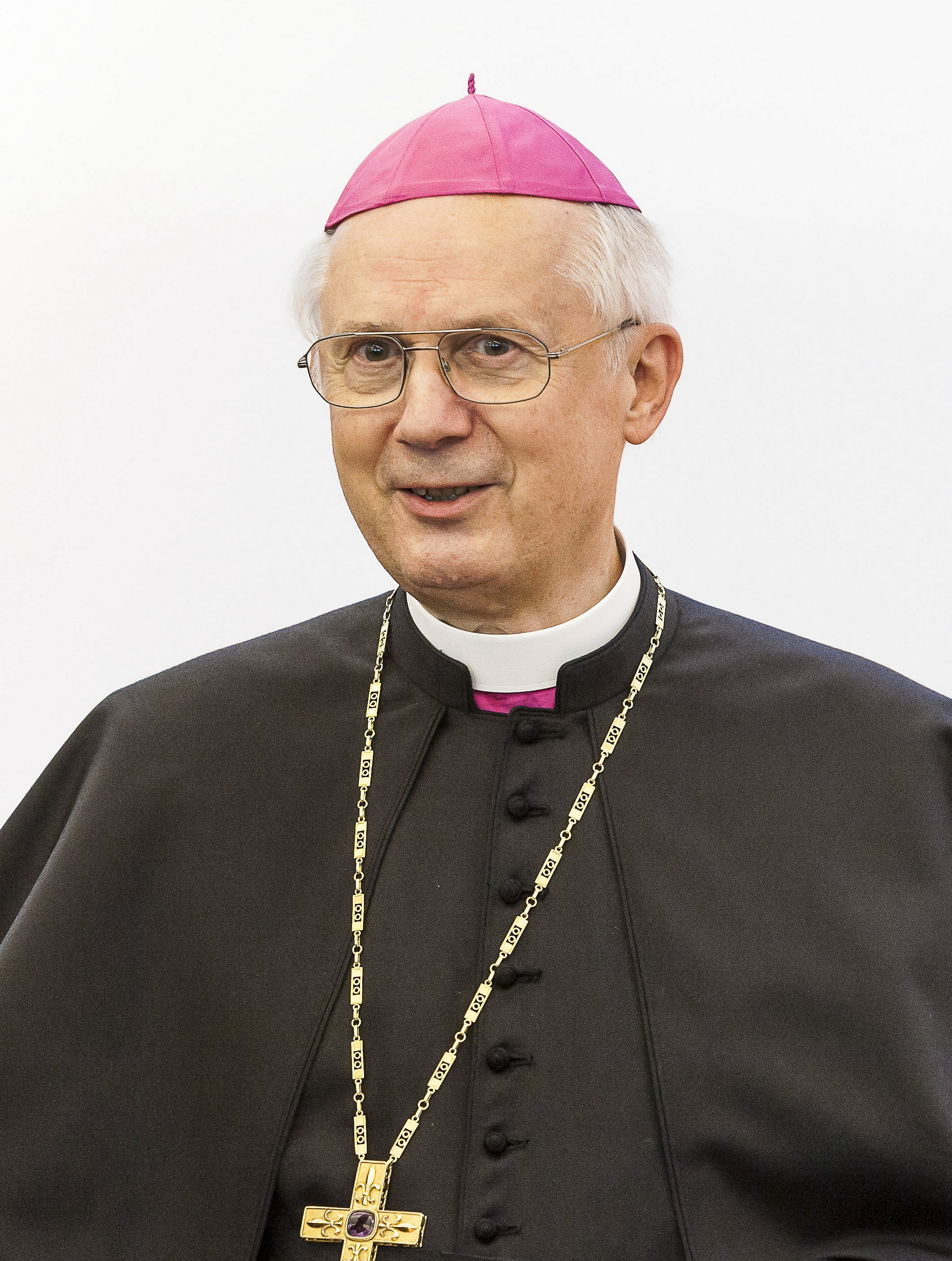 Bischof Egon Kapellari, 17. 9. 2012